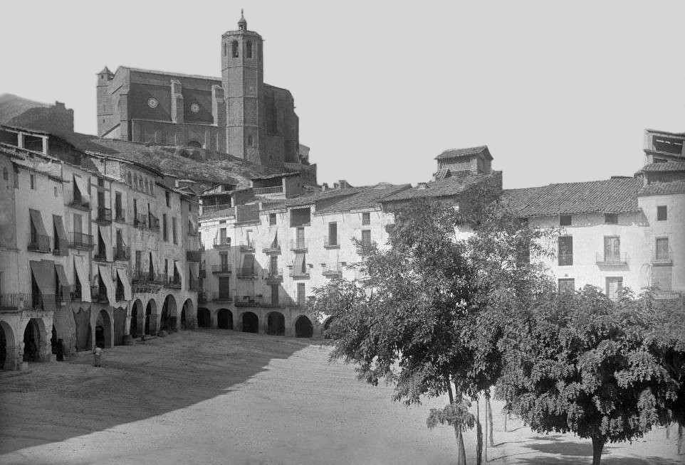 Imatge